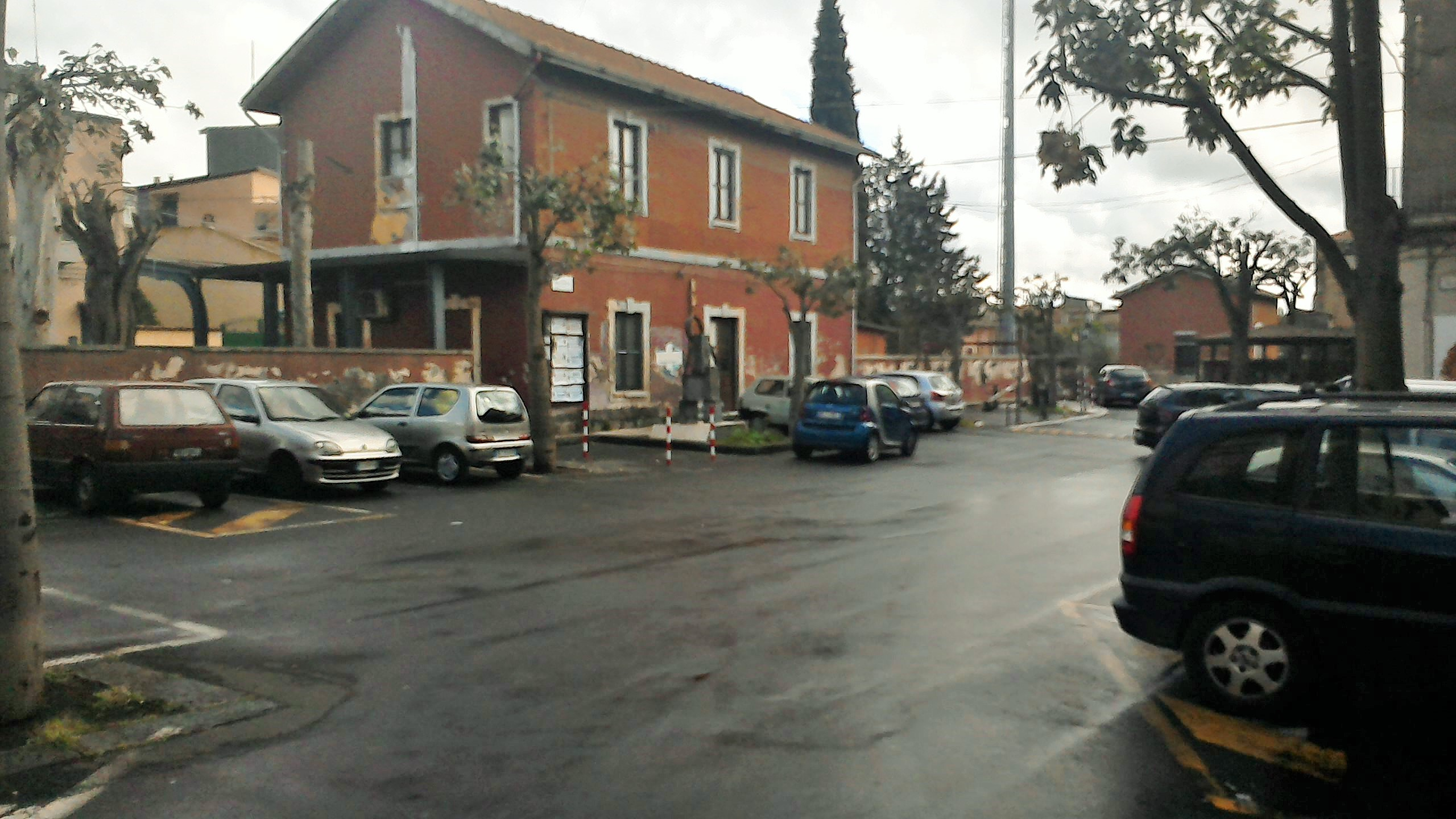 Piazza Orazio Costorella - Misterbianco